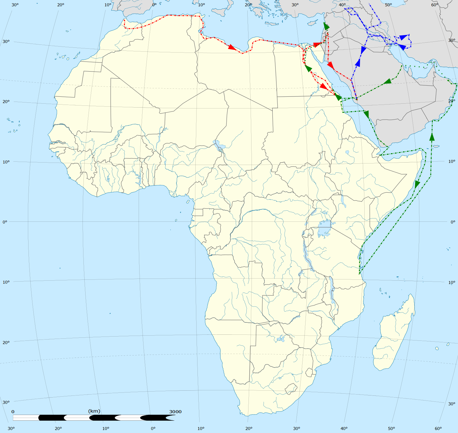 Ibn Battuta Reiseroute 1325–1332 (Nordafrika, Irak, Persien, die Arabische Halbinsel, Somalia, Swahili Küste)